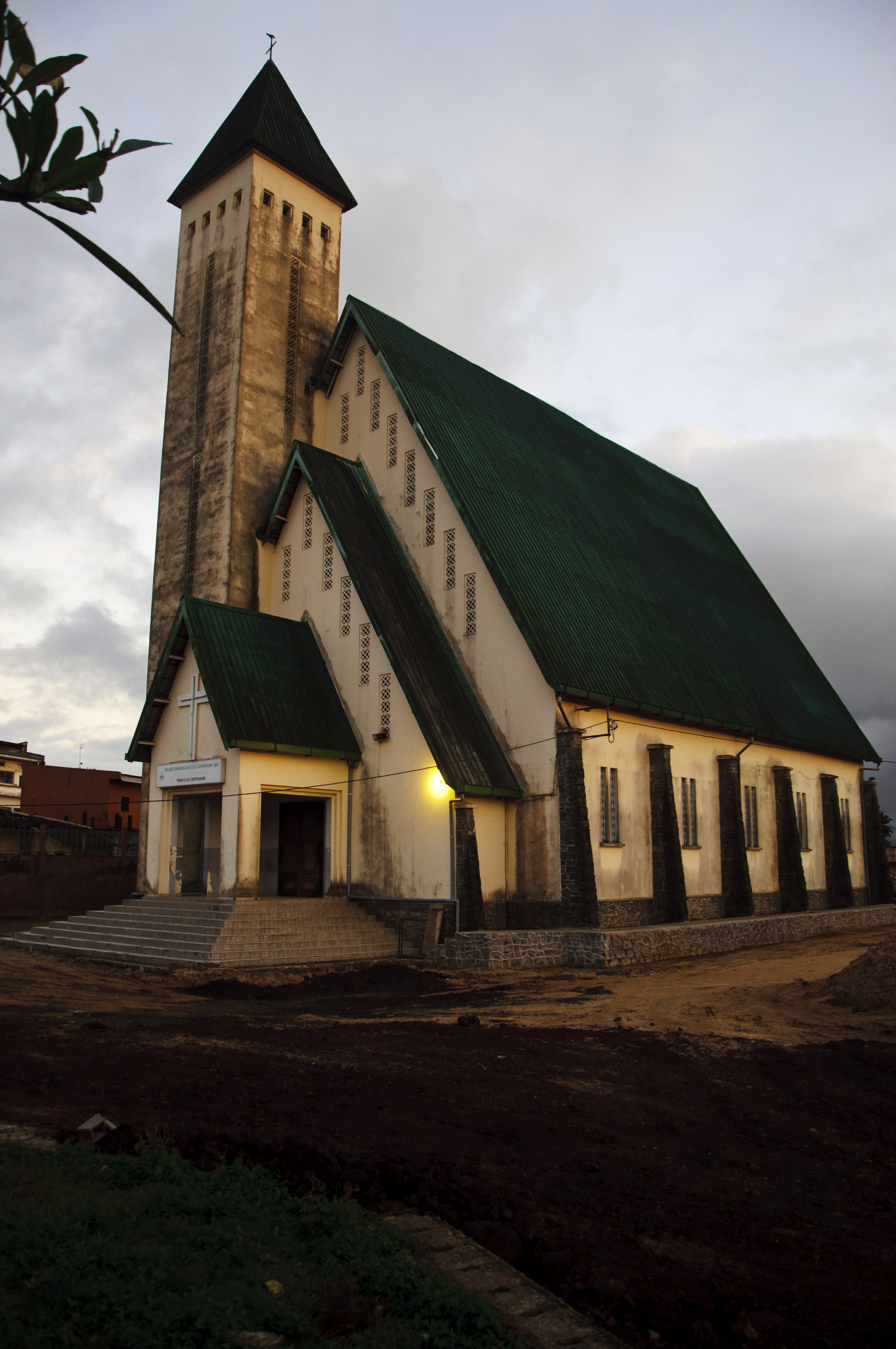 Temple du Centenaire Douala - Akwa